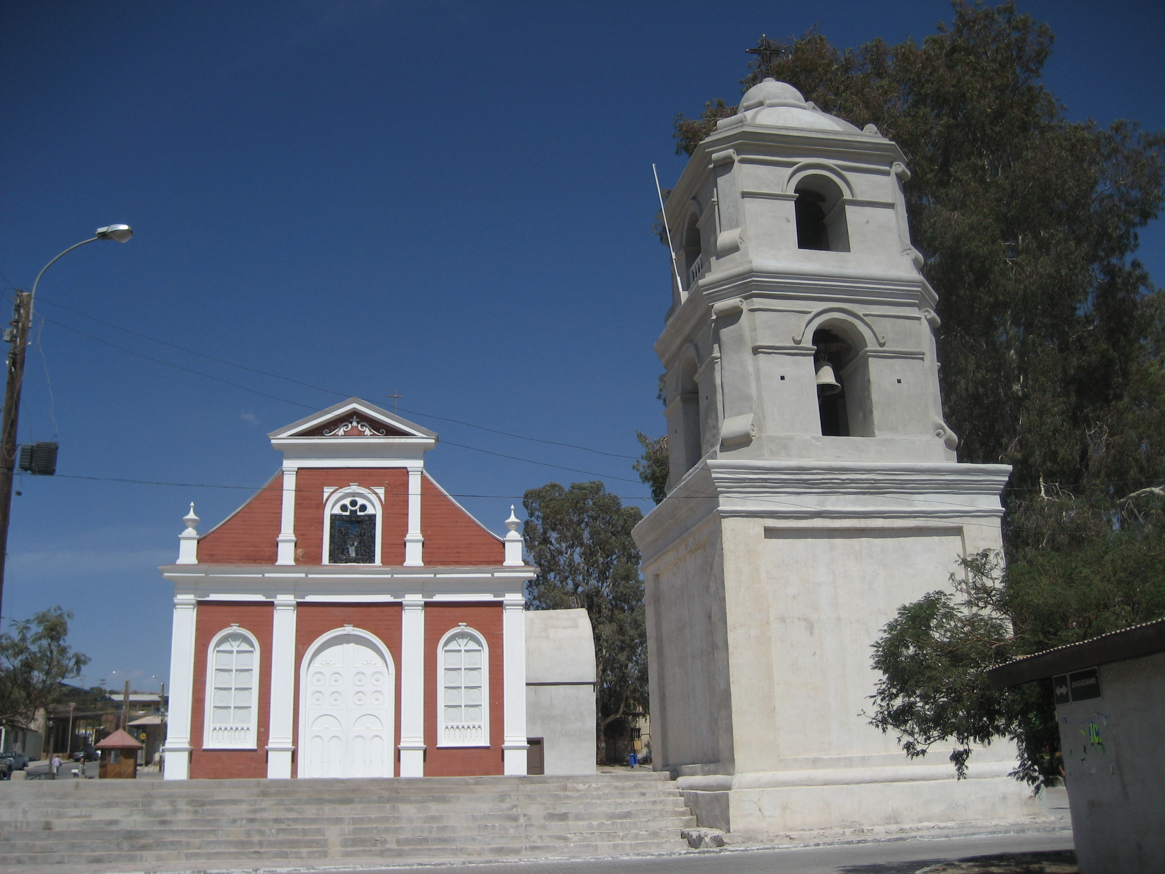 Iglesia de Matilla, Pica, Región de Tarapacá, Chile